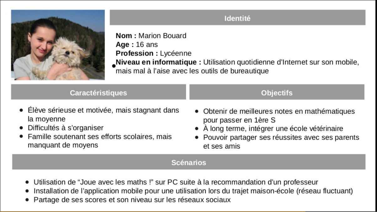 Exemple de persona